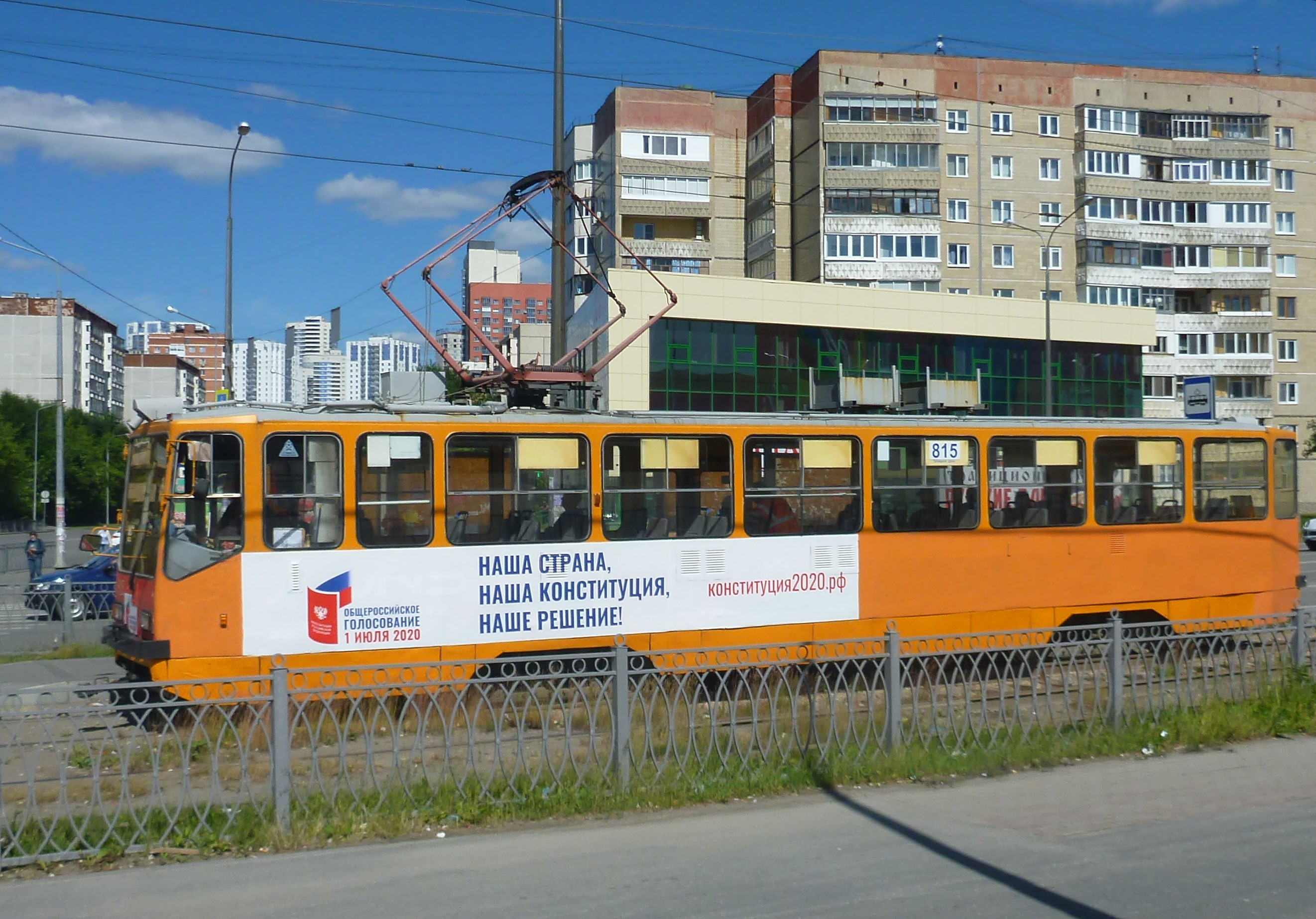 Трамвай 71-402 с агитацией за поправки к Конституции России в Екатеринбурге 14 июня 2020 года